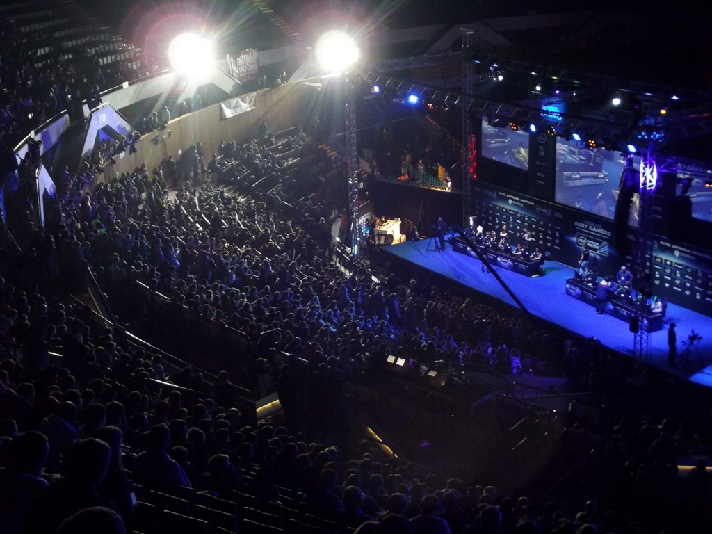 Zdjęcie zrobione podczas Intel Extreme Masters 2013 w katowickim Spodku.